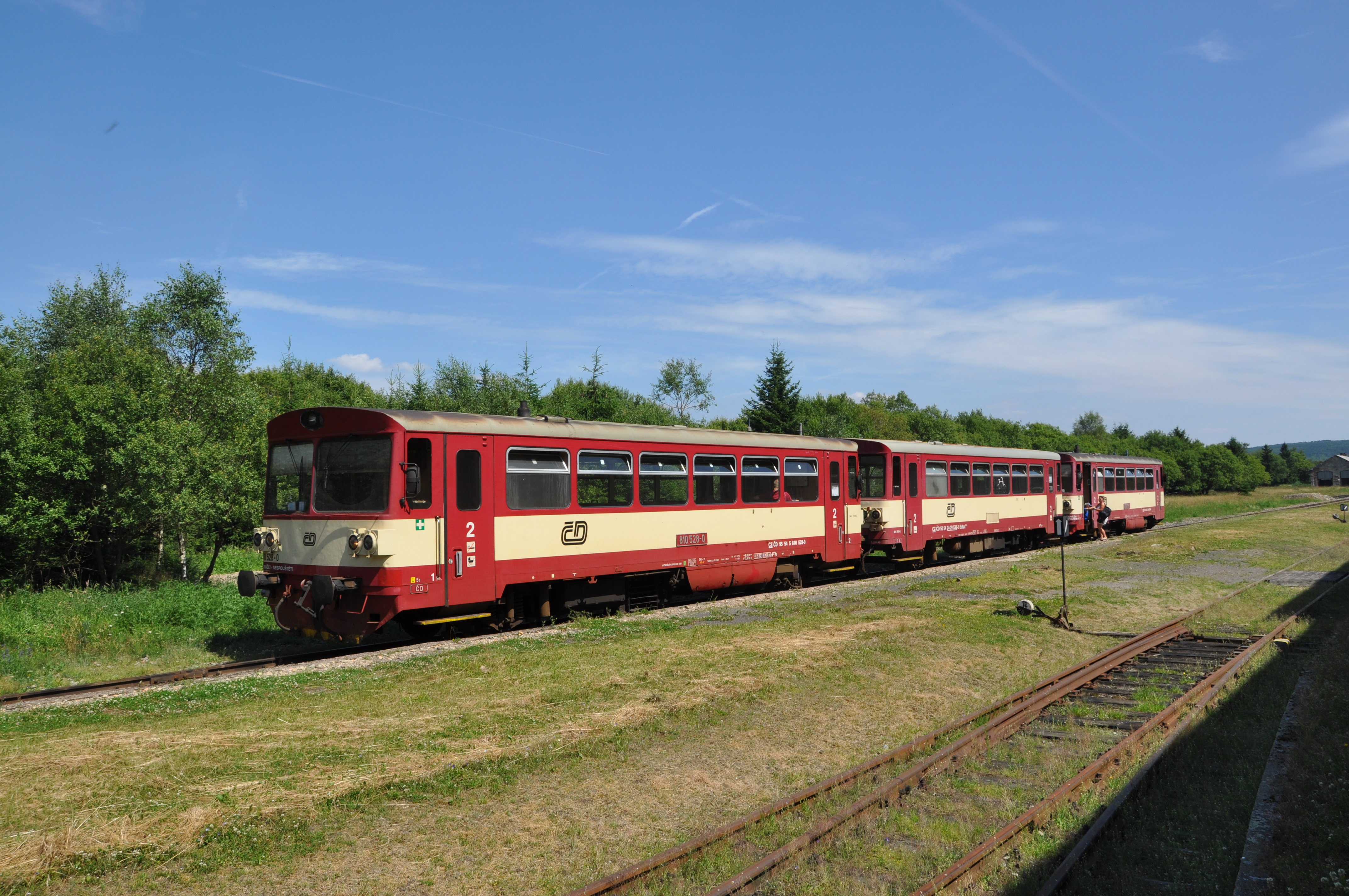 Reisezug der ČD im Bahnhof Moldava v Krušných horách